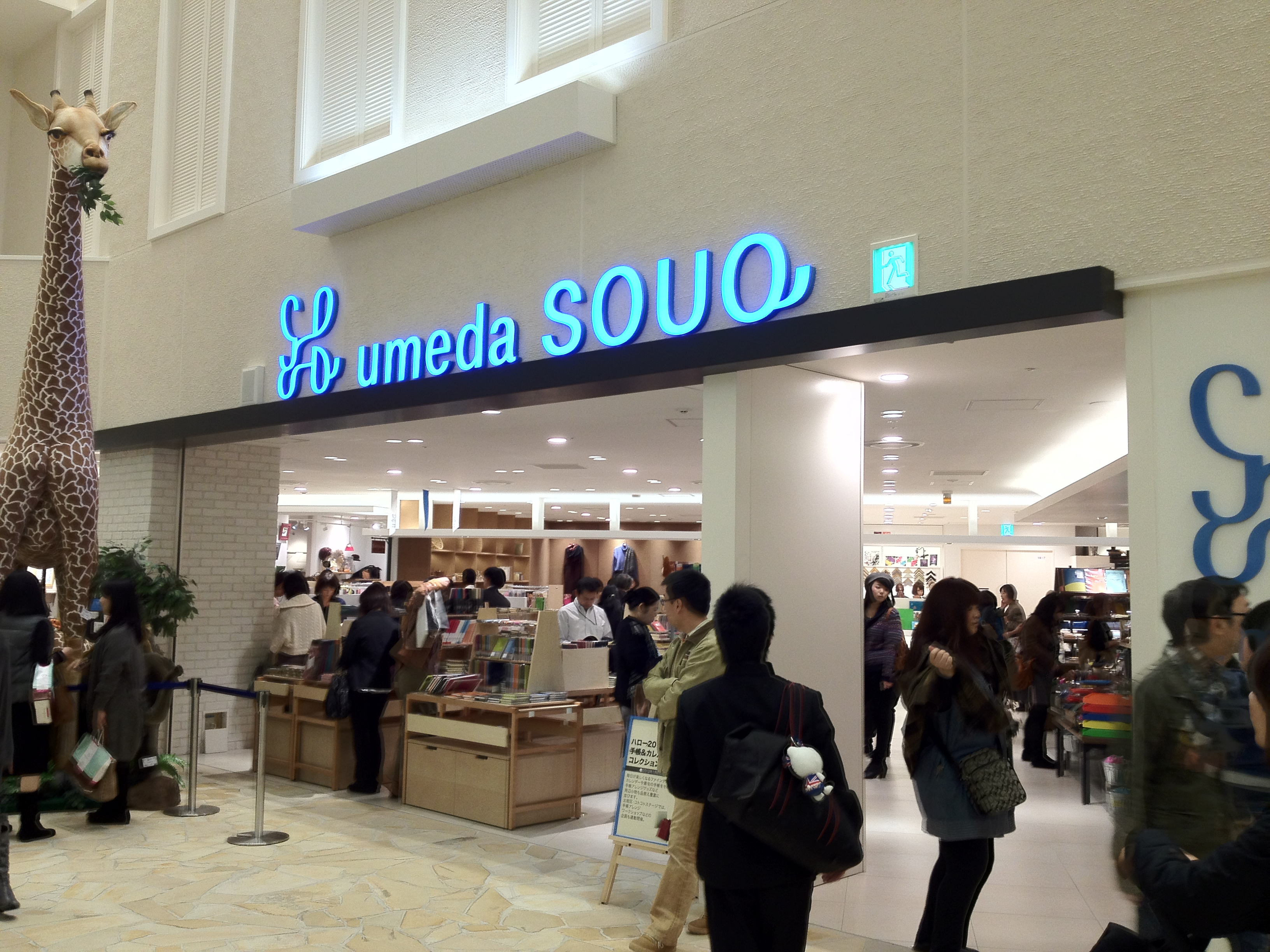 阪急うめだ本店 umeda SOUQ